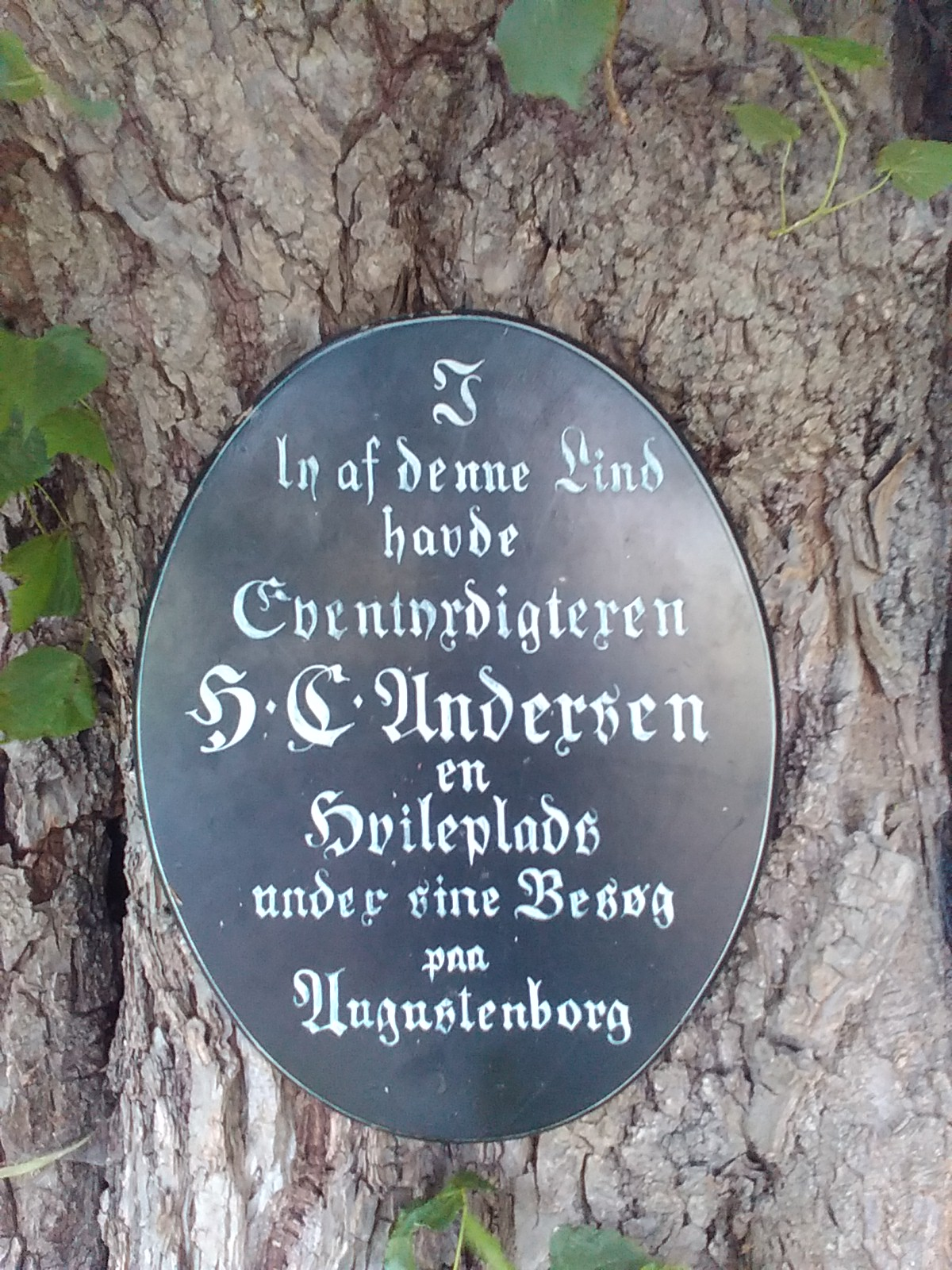 Tafel an der Linde im Schlosspark Augustenborg unter der der Dichter Hans Christian Andersen gesessen und gearbeitet hat.